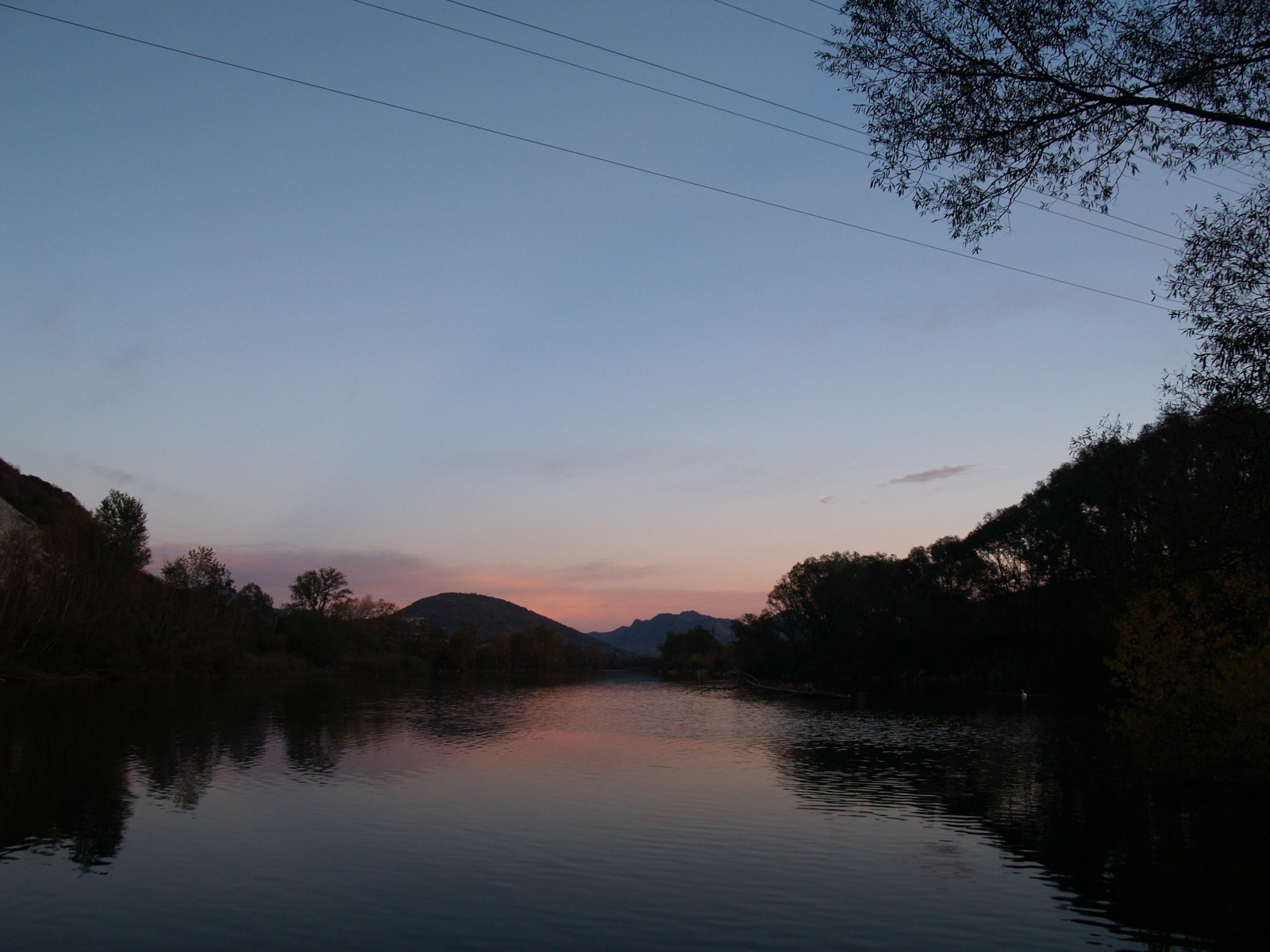 Il Fiume Toce con il suo immissario Torrente Strona